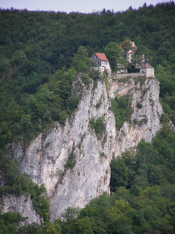 Burg Bronnen in imposanter Lage